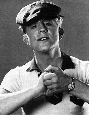 Rune Halvarsson